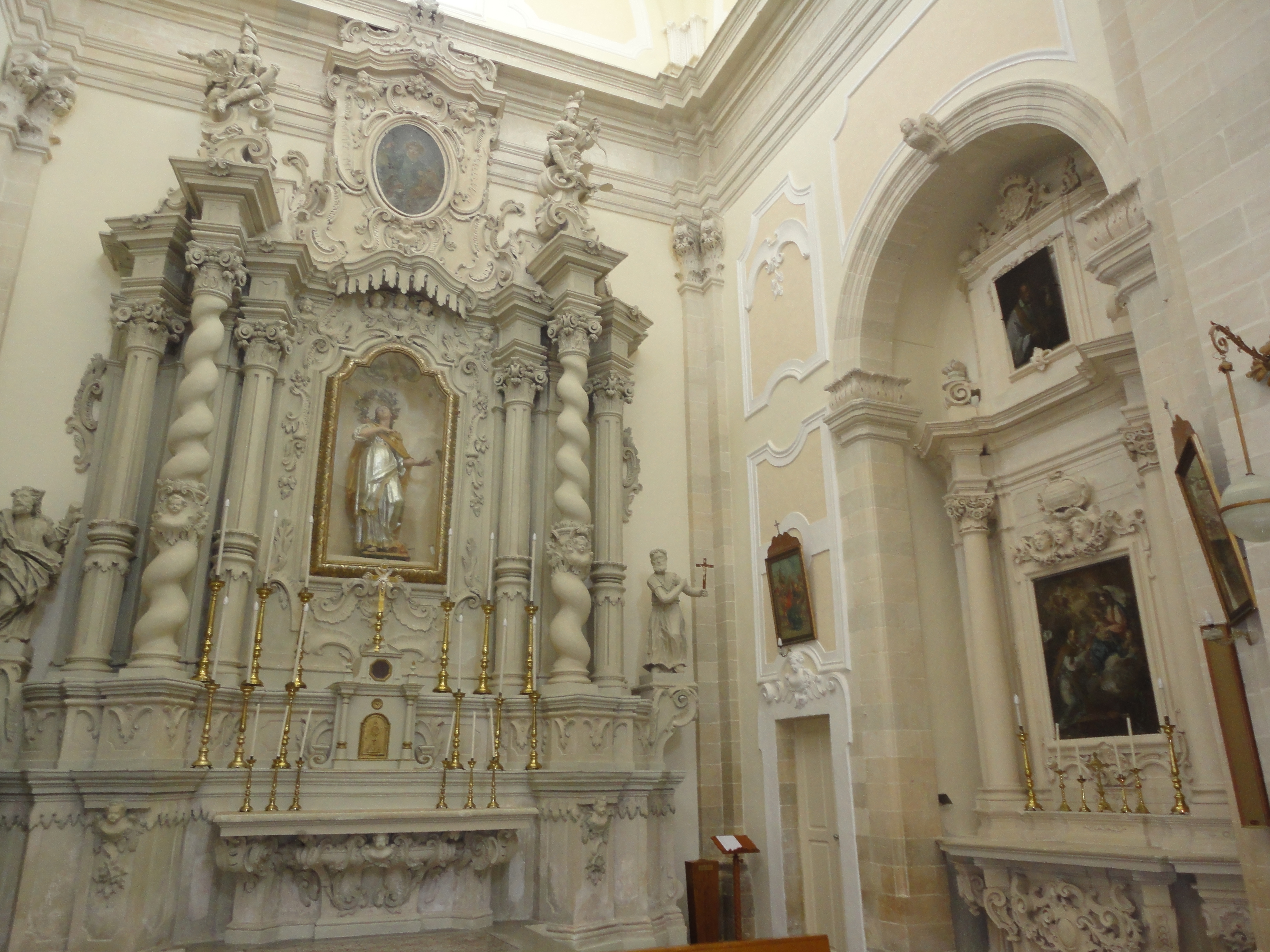 Uggiano la Chiesa transetto sinistro